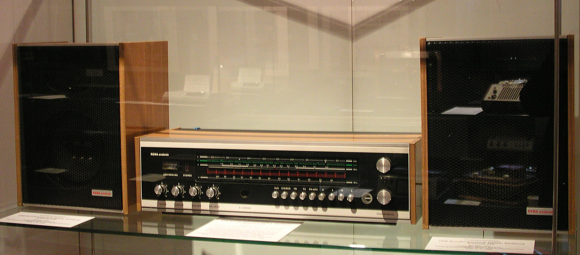 REMA andante Stereoradio